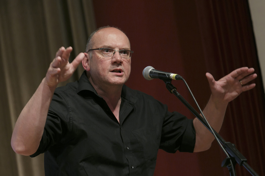 Guy Helminger beim Lyrik-Festival Poetic Voices of Africa in Köln